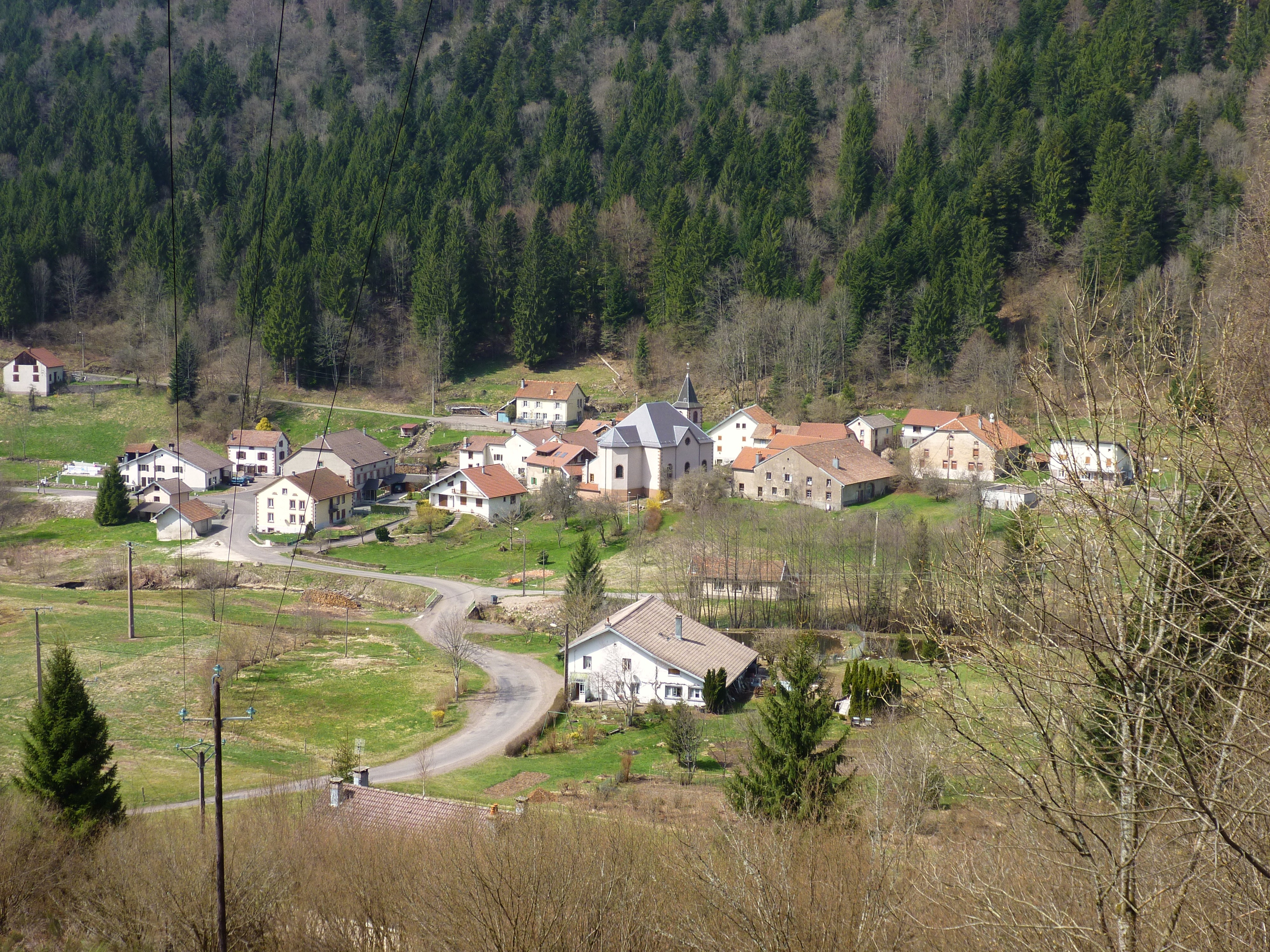 vue sur Miellin en contrebas.